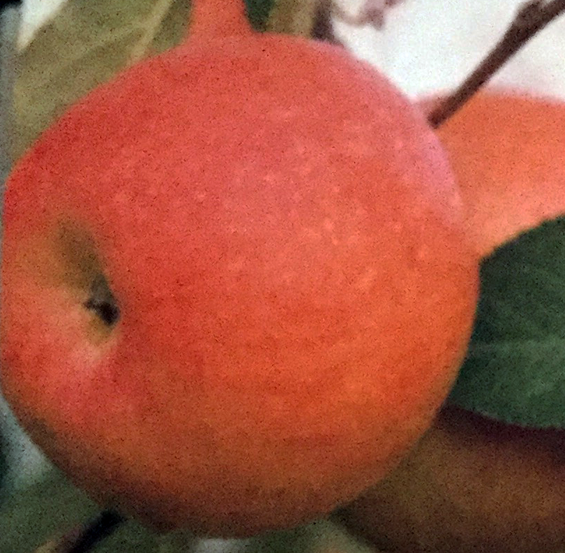 Manzana Fuji Nagafu 6